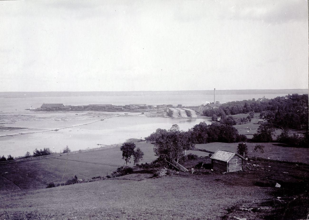 DIG91708. Nacka Sågverk, vid Klingefjärden, Alnön, Medelpad. Fotografiet är skänkt till Tekniska museet från Svenska Turistföreningen.